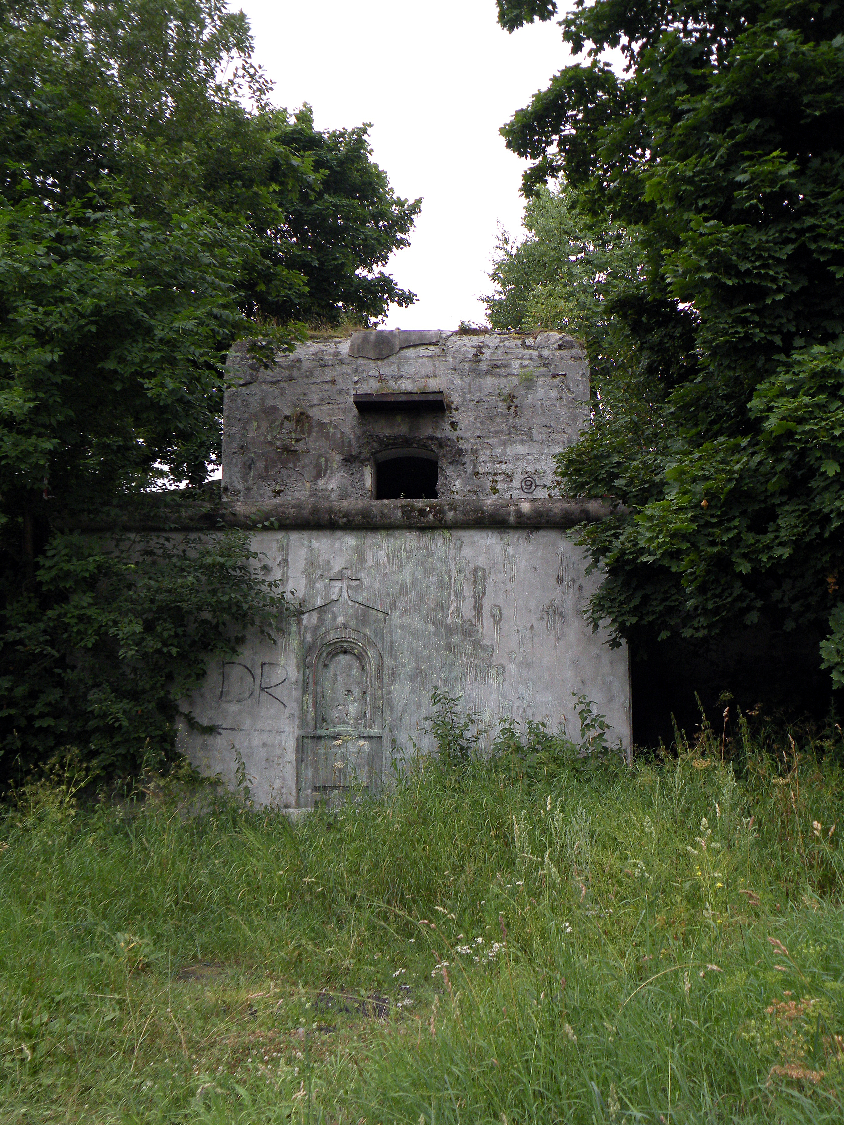 Кронштадт.Форт Шанц.Киот